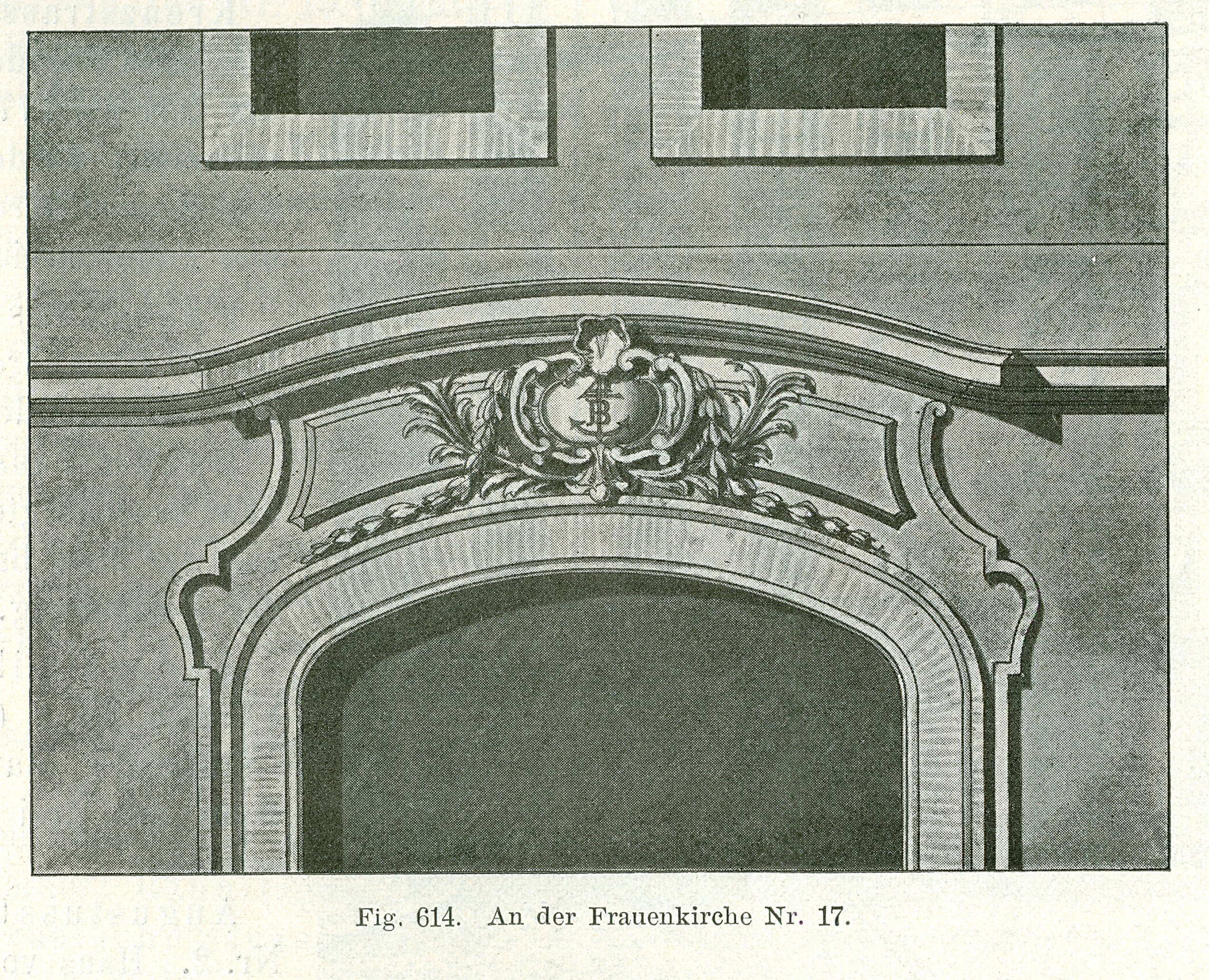 Portal des Börnerschen Hauses, An der Frauenkirche 17, in Dresden.